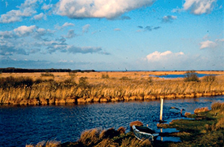 Guérande Brière France marais